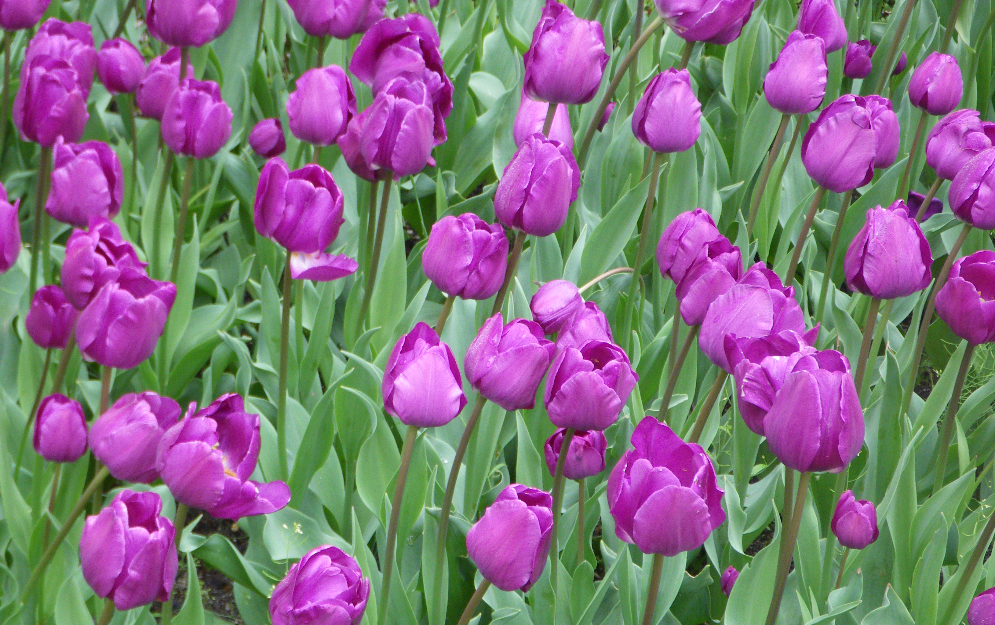 Tulipa 'Negrita', gr. Triumph. Real Jardín Botánico, Madrid, España.